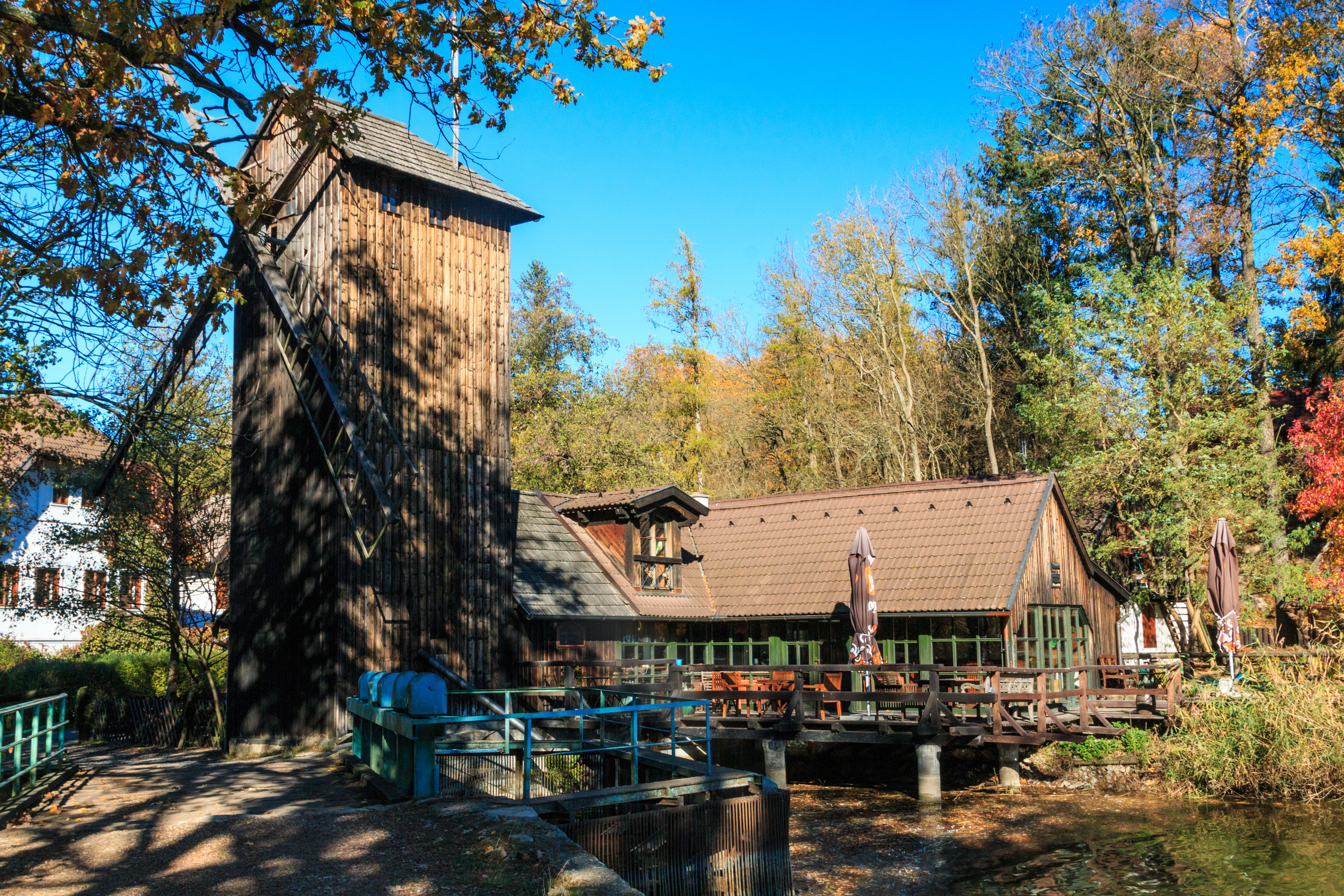 Bučický mlýn